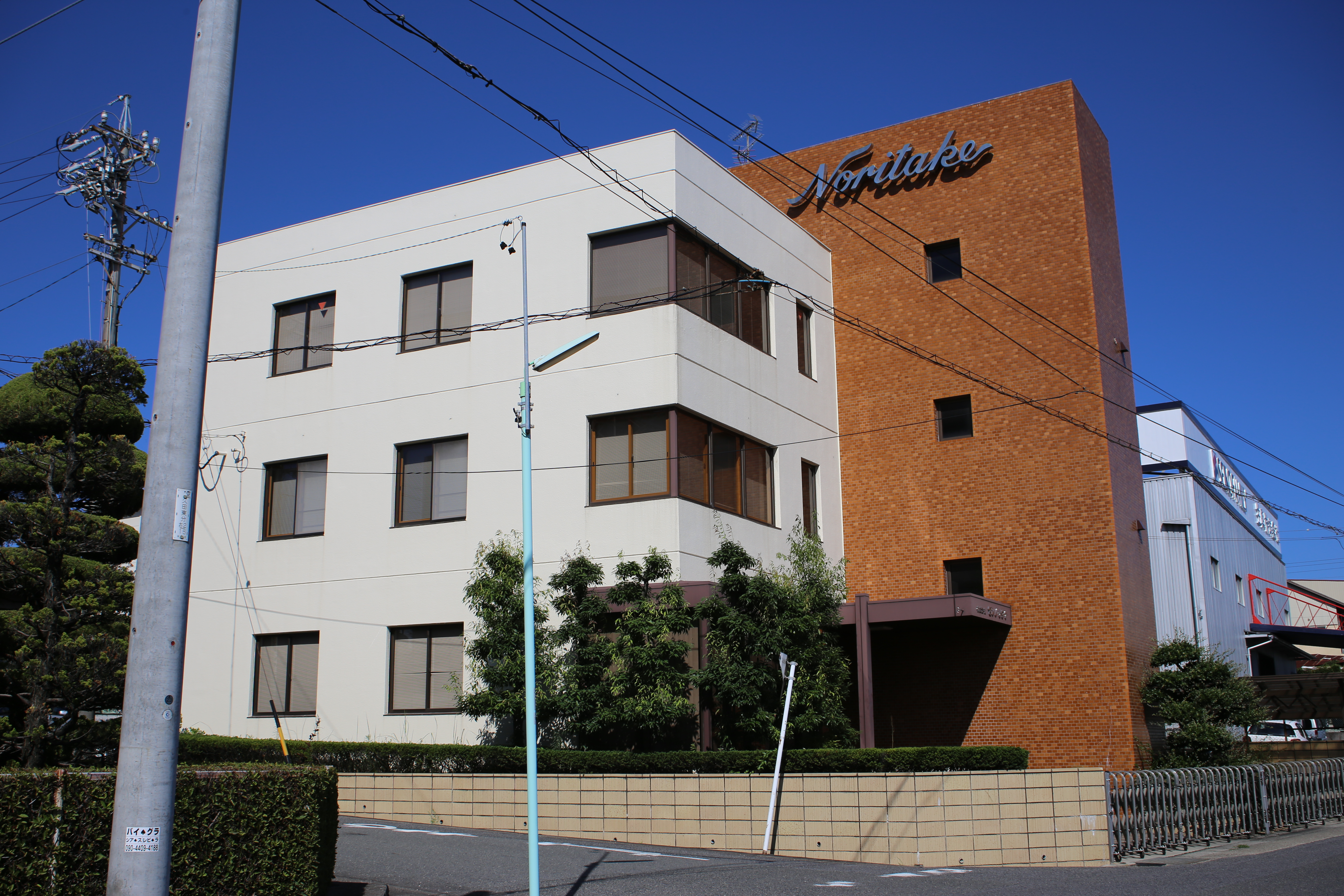 名古屋市名東区小井堀町のゼンノリタケ本社を南側公道西側より撮影